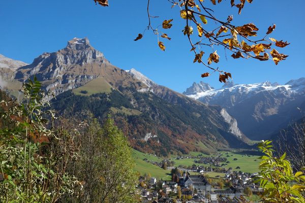 Das Kloster Engelberg und der Hahnen.